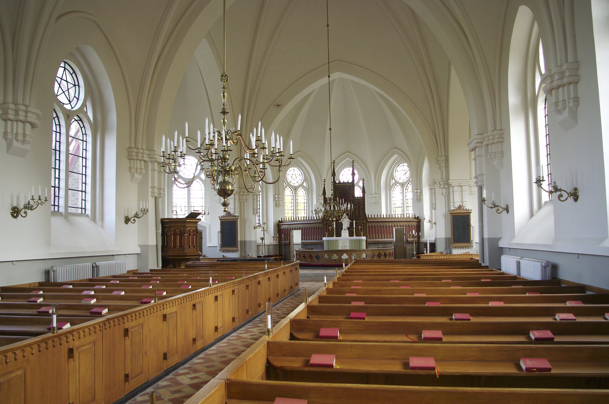 Håslöv kyrka, Skåne, Sweden.